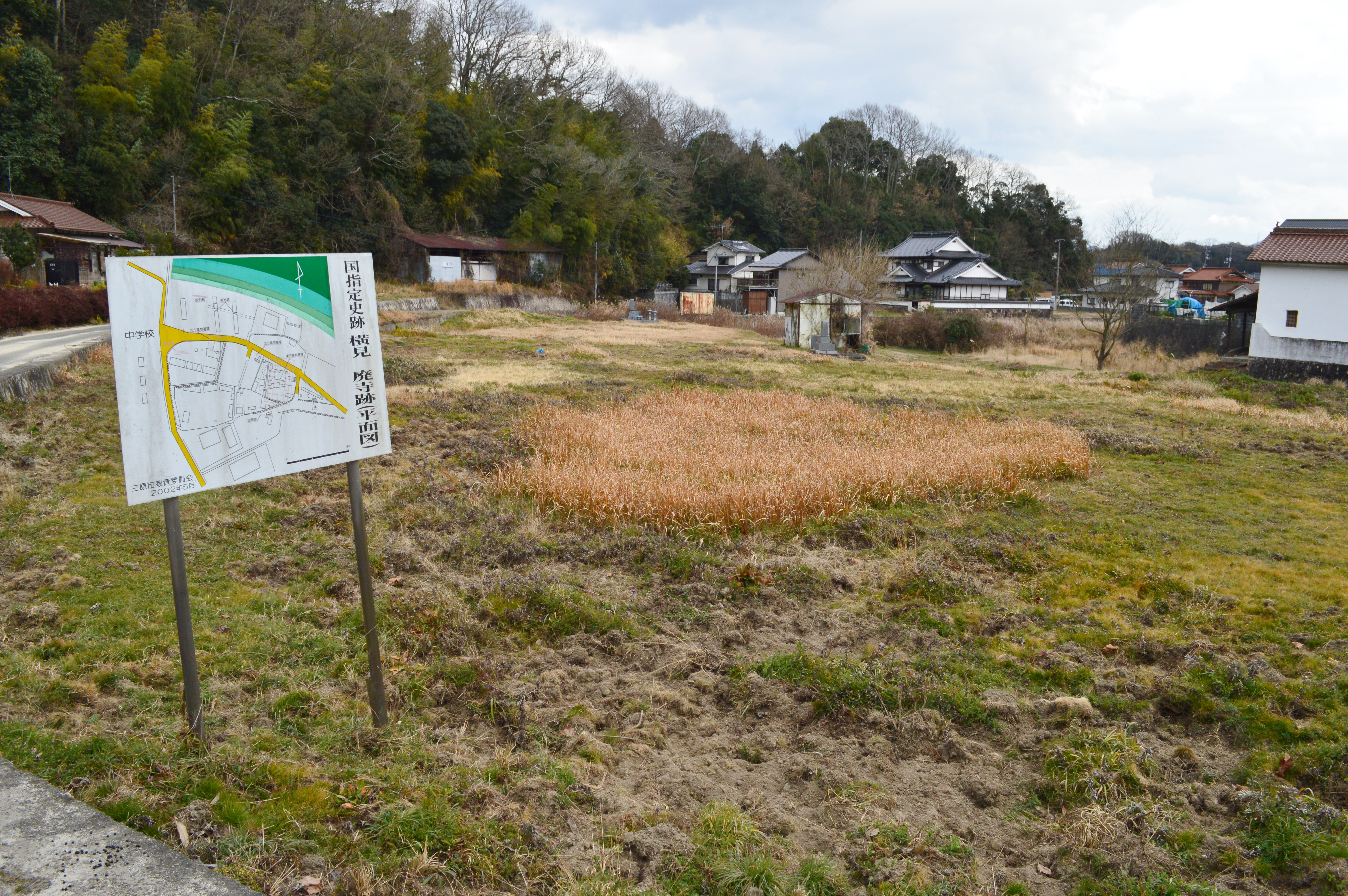 横見廃寺跡 概観 Nikon D3200